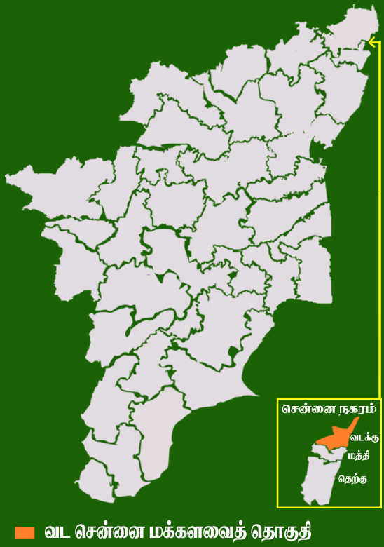 தமிழக வரைபடத்தில் உள்ள வட சென்னை மக்களவைத் தொகுதி